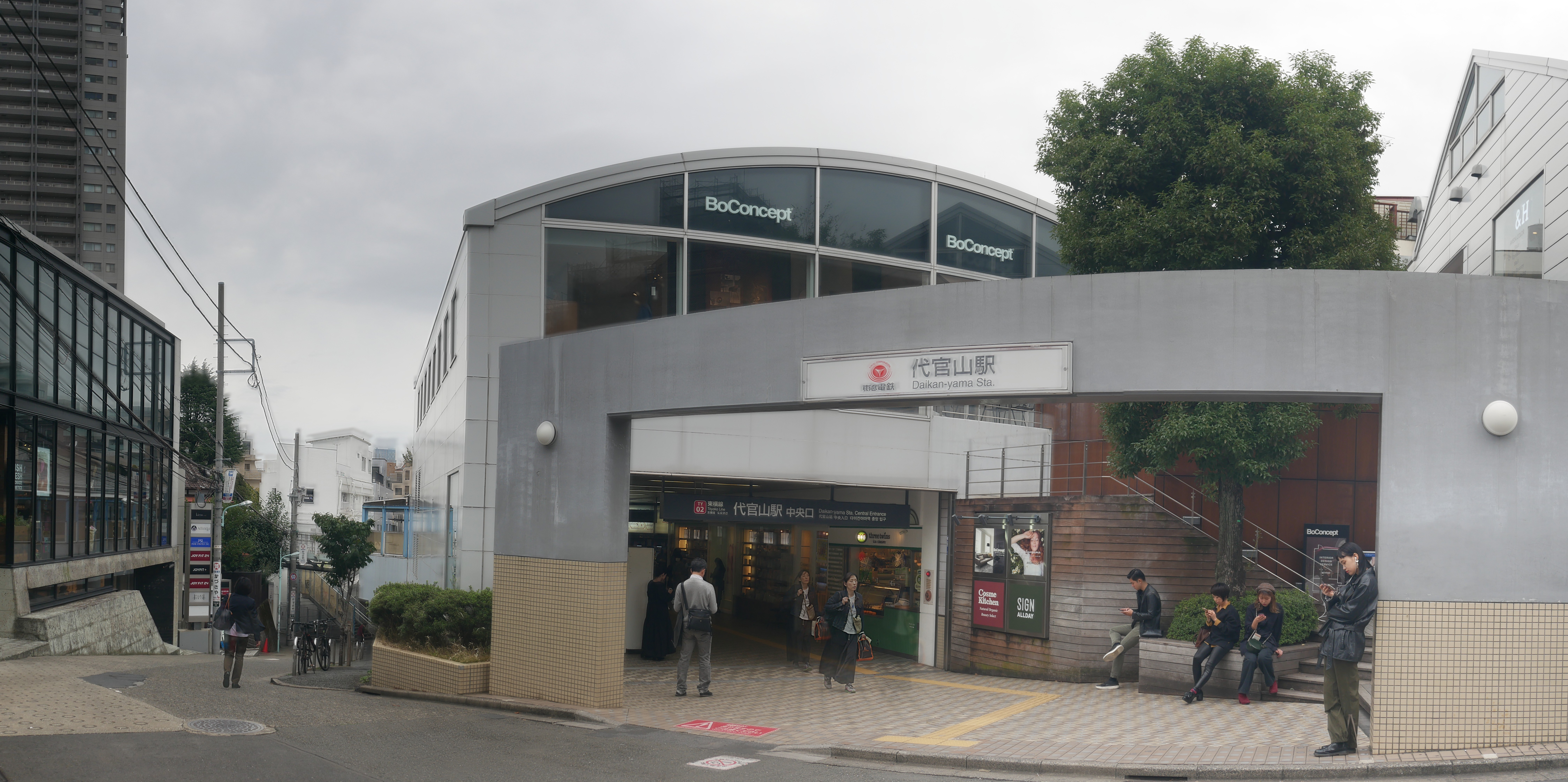 Daikan-yama Station (代官山駅)